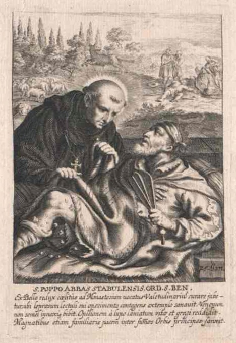 St. Poppo von Stablo, Benediktiner (978-1048), Darstellung aus dem 17. Jahrhundert